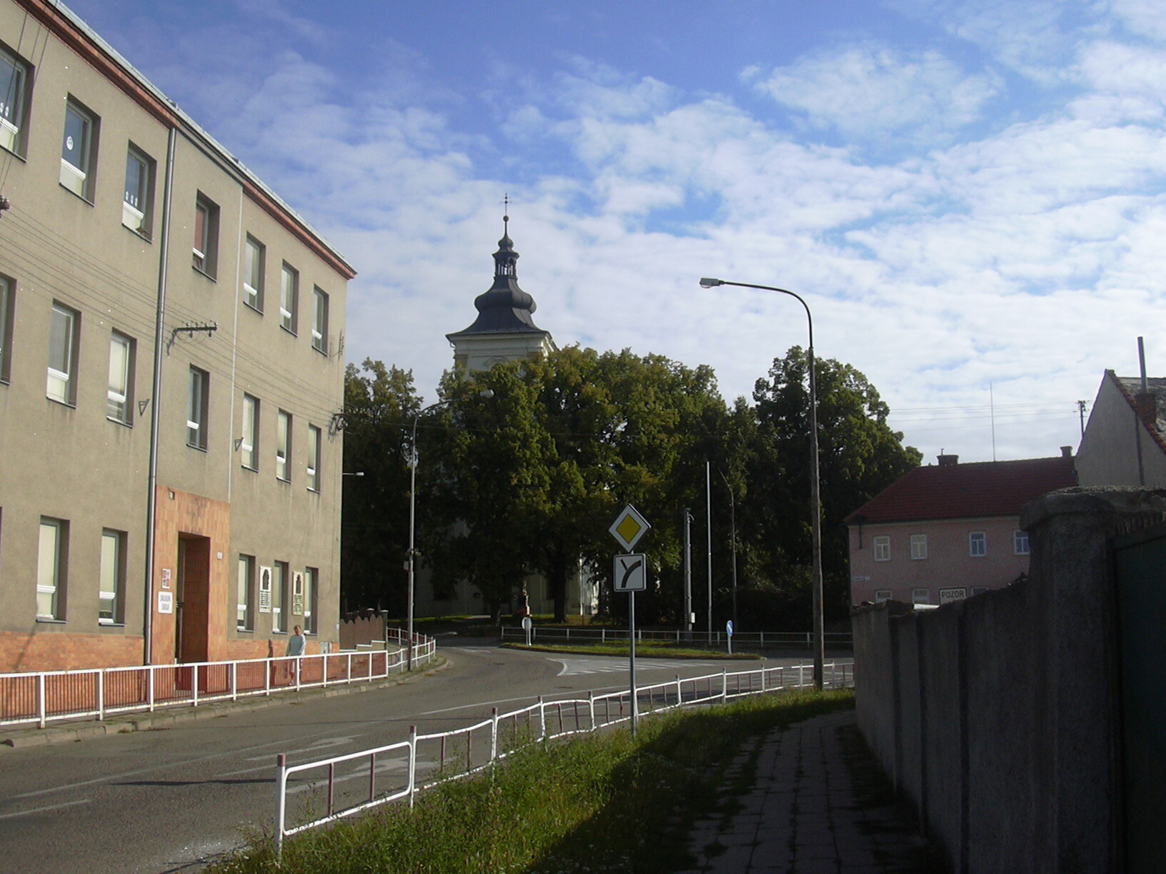 Vrahovice místní část Prostějova